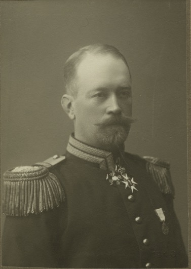 Hovjägmästaren Fritz Edelstam 1910